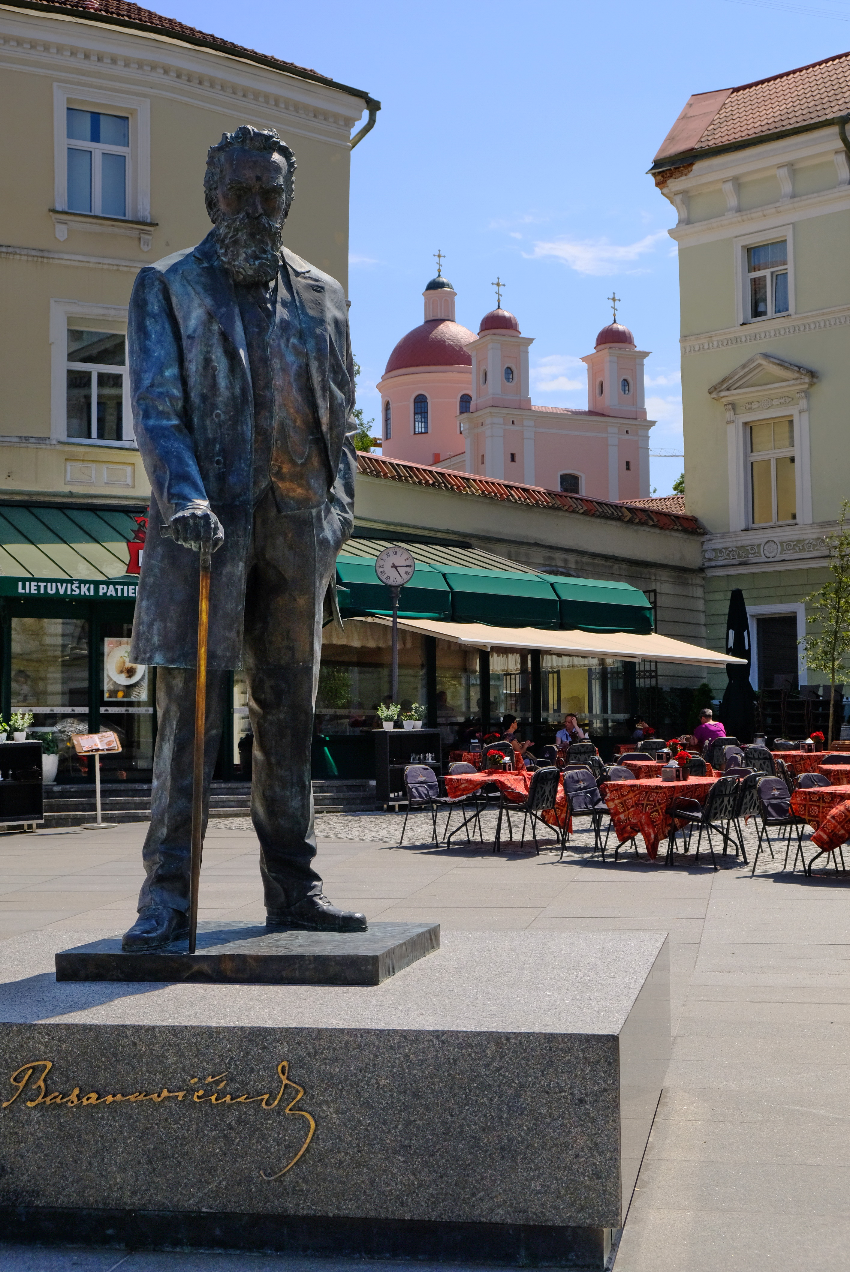 Новодельный памятник Ивану Басановичу в Вильне на Островоротной улице